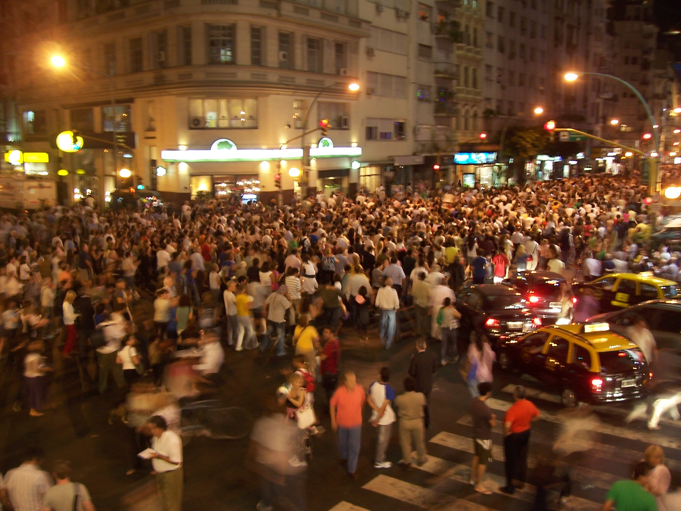 El "cacerolazo" masivo de los argentinos en defensa del campo en Marzo de 2008.